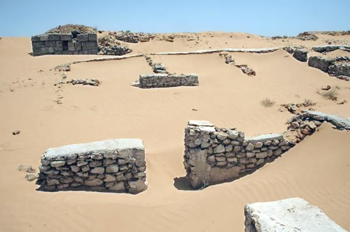 Das Kastell Gholaia, das durch antike Quellen auch als castra Chol(aia), [G]olas sowie in der Tabula Peutingeriana als Chosol überliefert ist, war ein römisches Militärlager, das für Sicherungs- und Überwachungsaufgaben am vorderen Limes Tripolitanus, einem tiefgestaffelten System von Kastellen und Militärposten, in der römischen Provinz Africa proconsularis zuständig war. Blick nach Süden über das Praetorium.